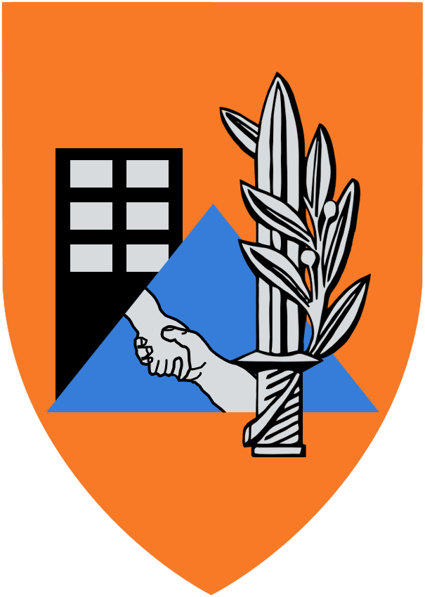 תג בסיס ההדרכה של פיקוד העורף - בה"ד 16.